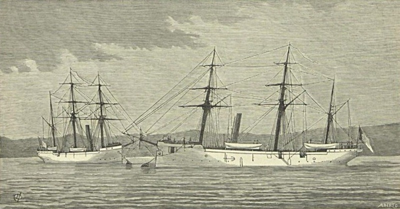 Canhoneiras Zaire e Liberal da Marinha Potuguesa